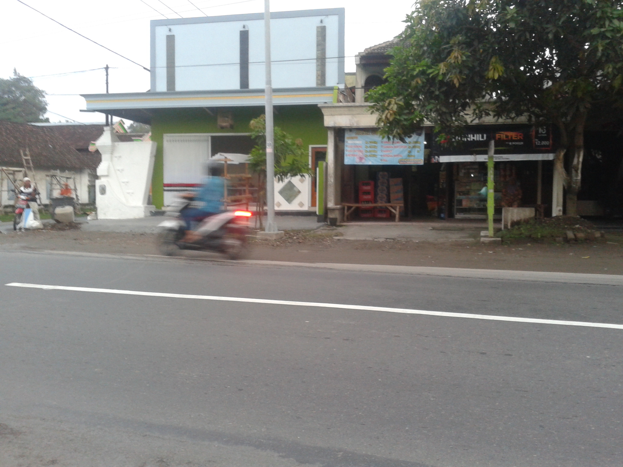 Eks Halte Wonokasihan